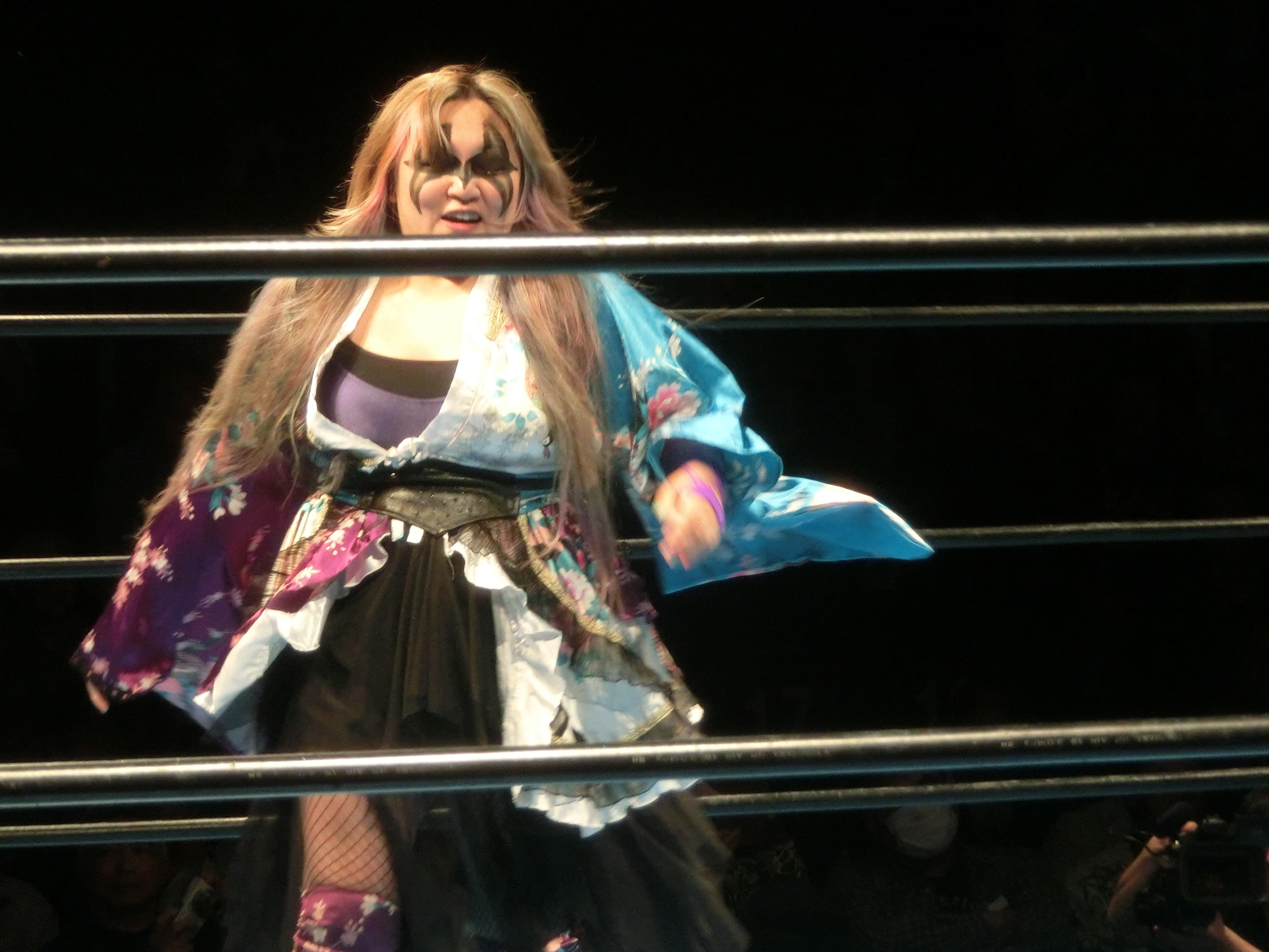 カラーズ新木場2019年5月